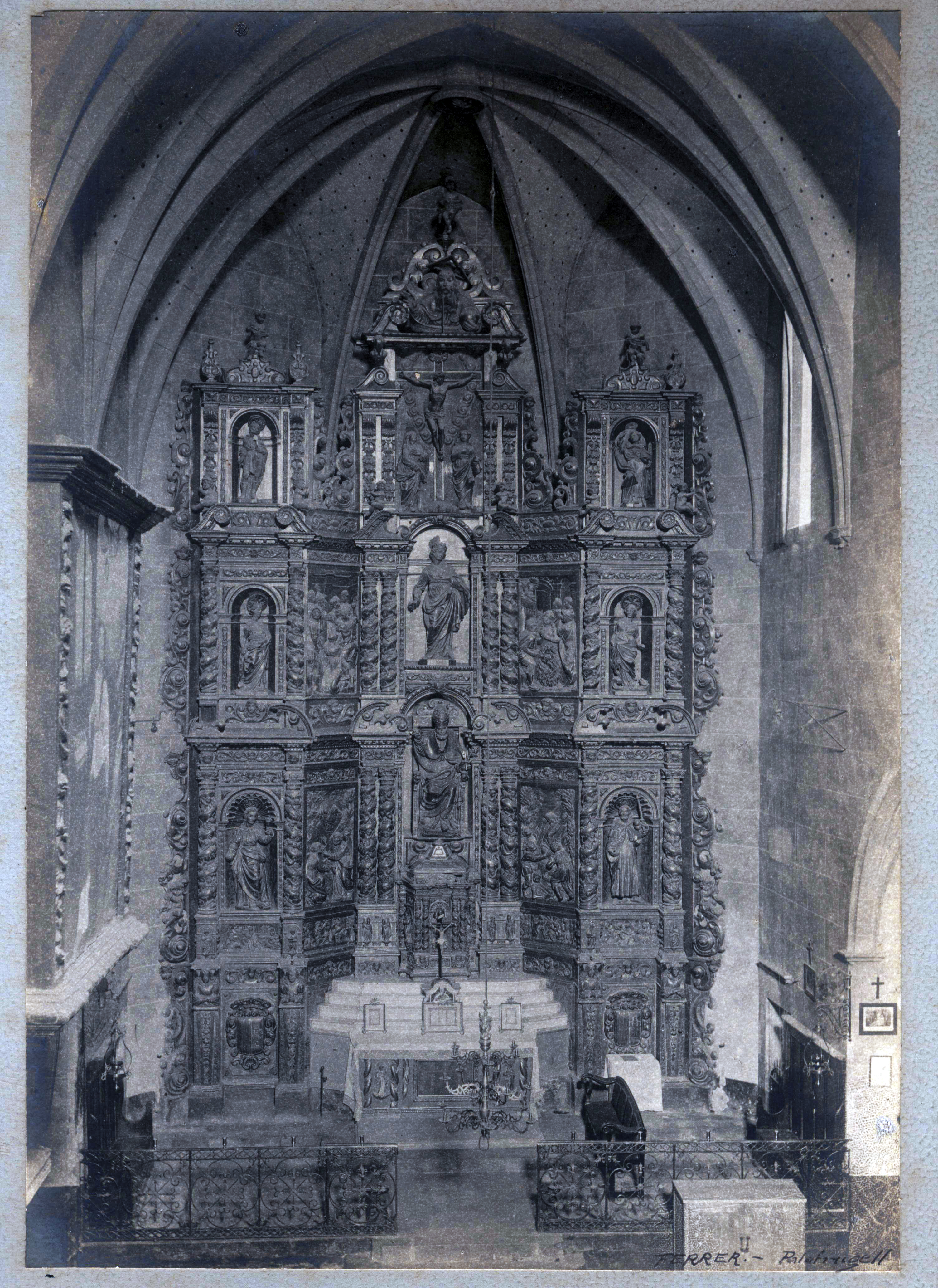 Fotografia del retaule de Sant Pere de Begur publicada a la revista Es pedrís llarg